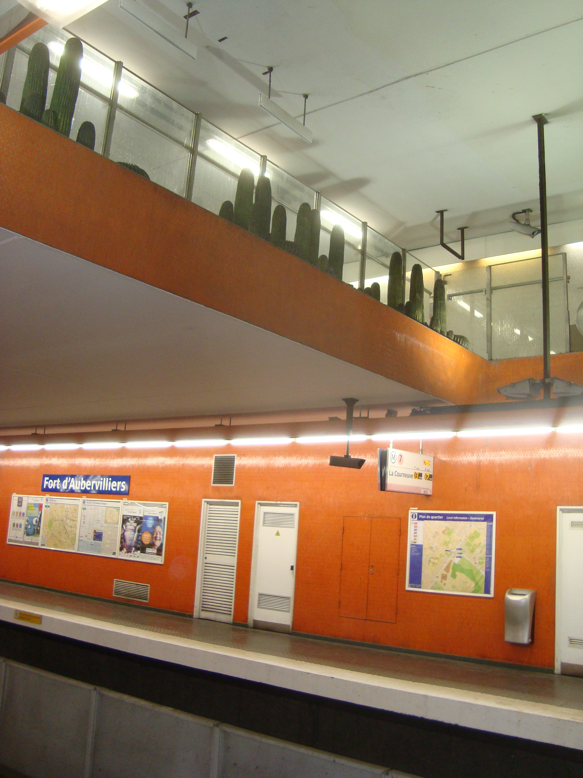 Vue des quais de la mezzanine qui surplombe les quais et les voies de la station de métro Fort d'Aubervilliers sur la ligne 7.